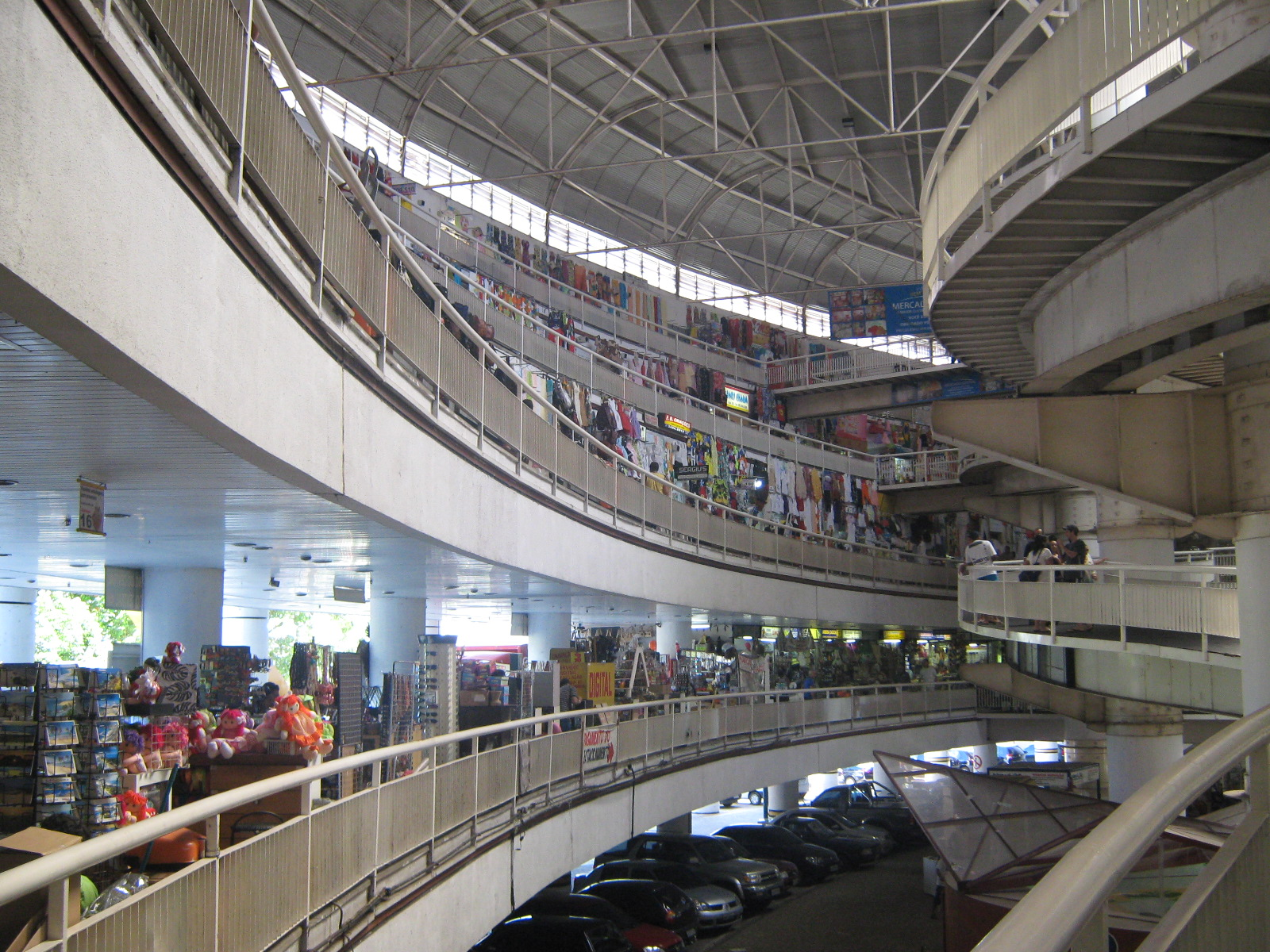 Central Market,Fortaleza, Brazil